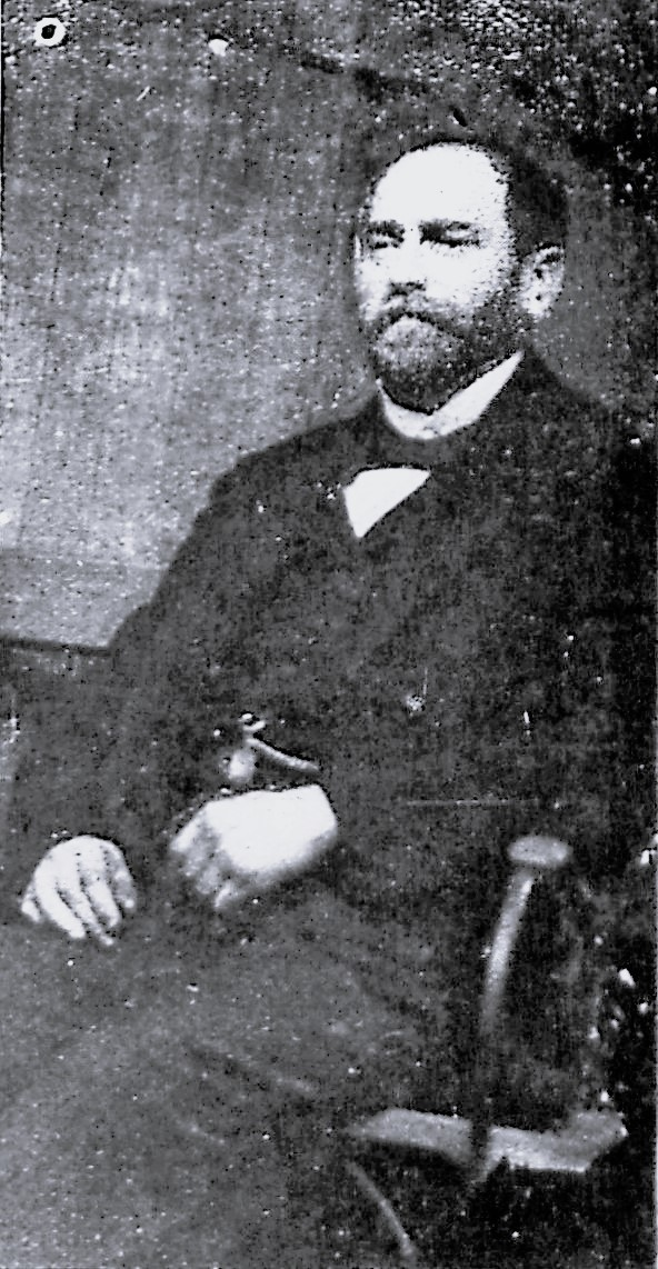 August Pape, Fabrikant, Eigentümer der Miesner & Pape